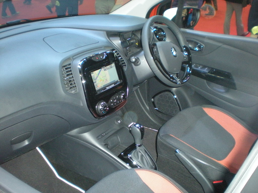 ルノー・キャプチャー